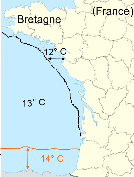 Température de de la mer au 8 janvier 2012. De l'été 2011 au 8 janvier 2012, extrème douceur.